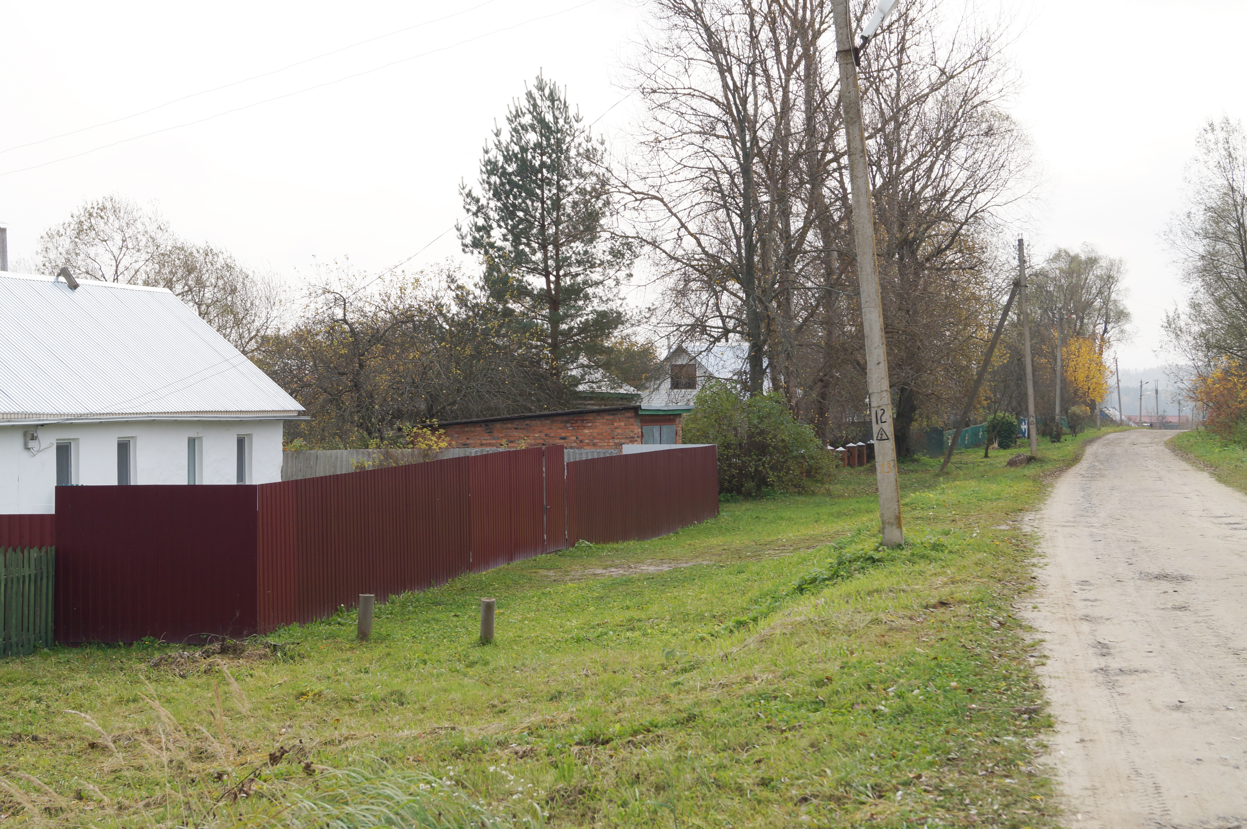 Поляки (Думиничский район)